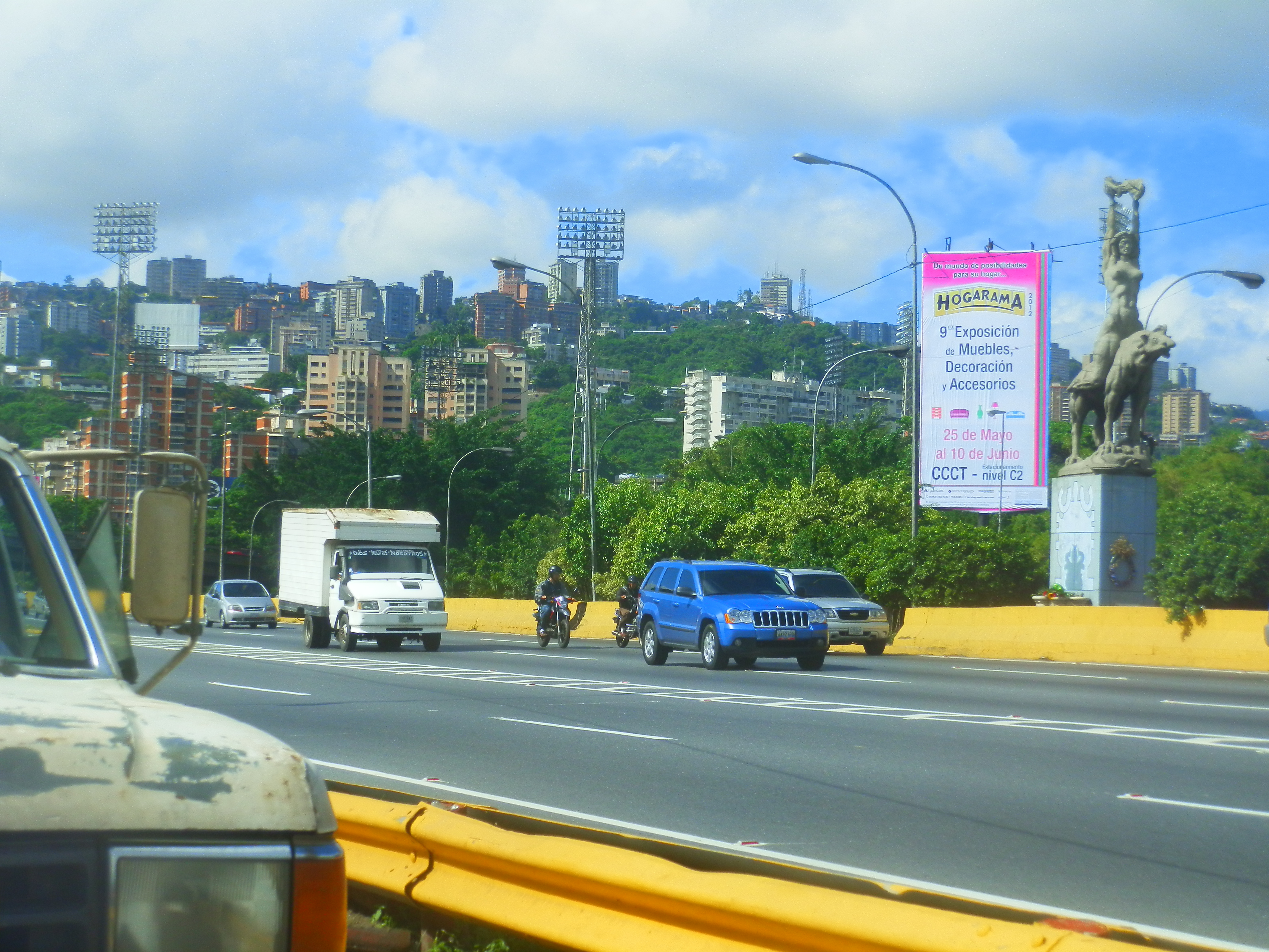 Monumento de María Lionza en Caracas, Venezuela